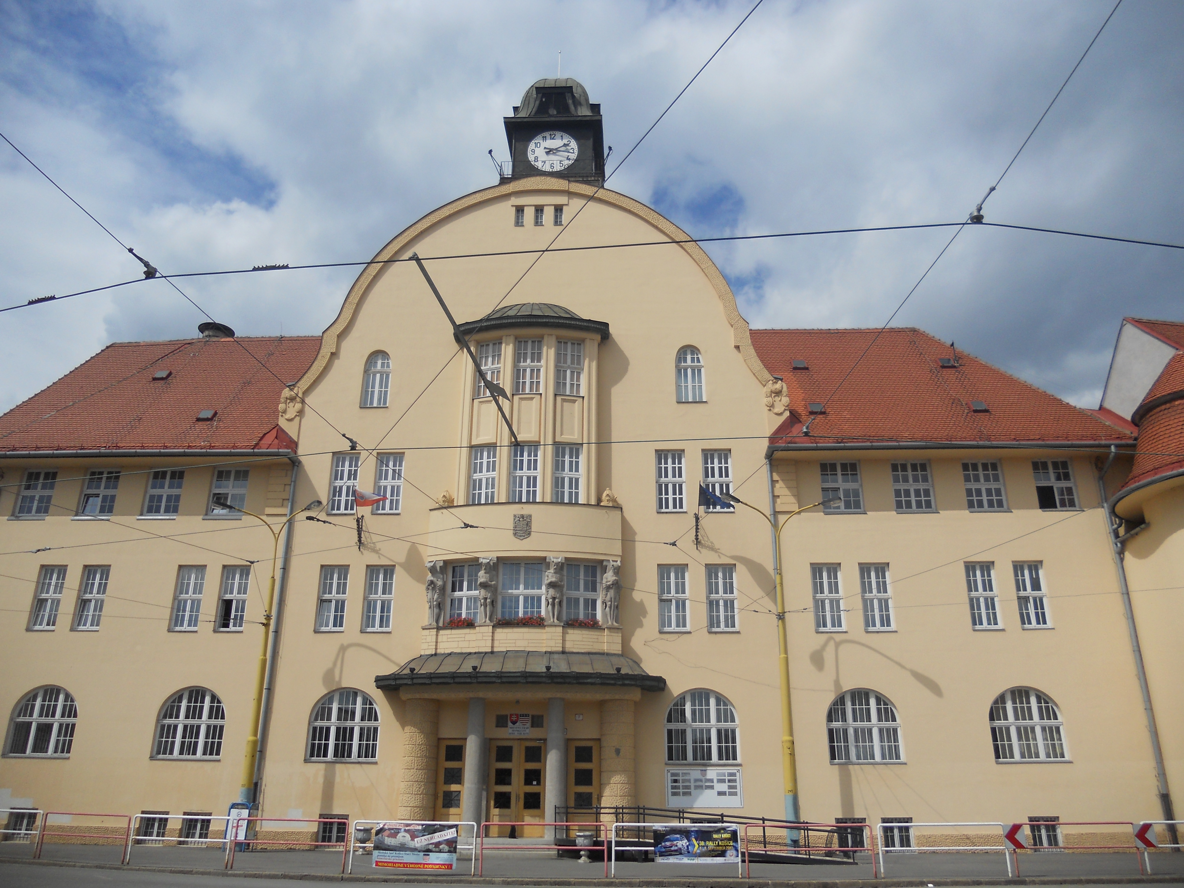 BUDOVA ADMINISTRATÍVNA+solitér,nárožný; Miestny úrad